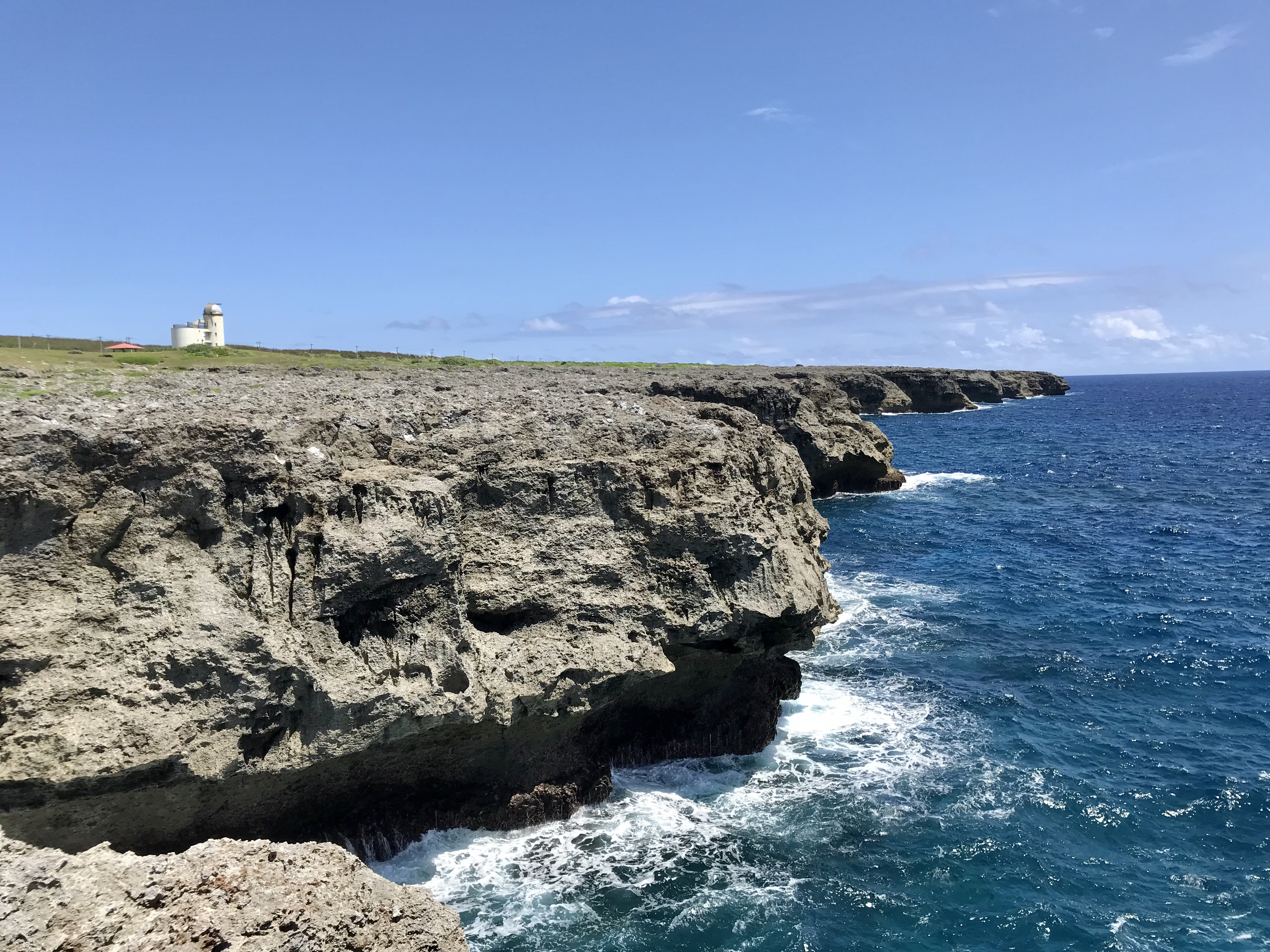 沖縄県波照間島高那崎